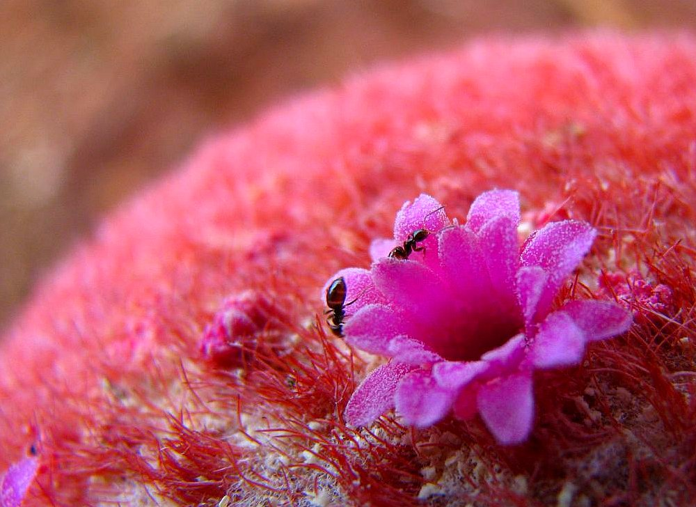 florzinha do cactus daqui de casa... o coroa de frade! bjim e boa quinta